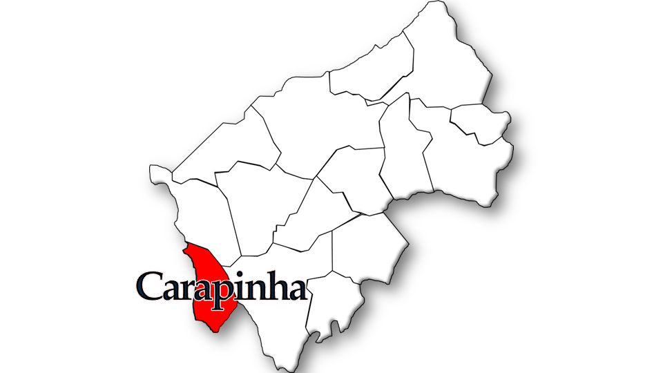 População